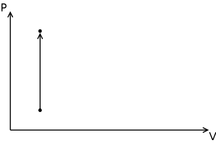 Darstellung einer isochoren Zustandsänderung in einem PV-Diagramm